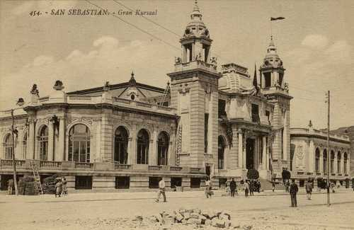 San Sebastián: Gran Kursaal (Gipuzkoa, Spain)